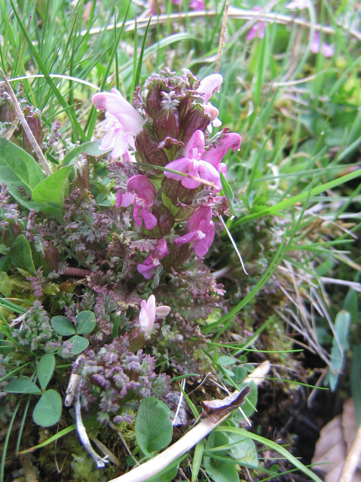 Pédiculaire des bois (Aubrac, Massif central, France)